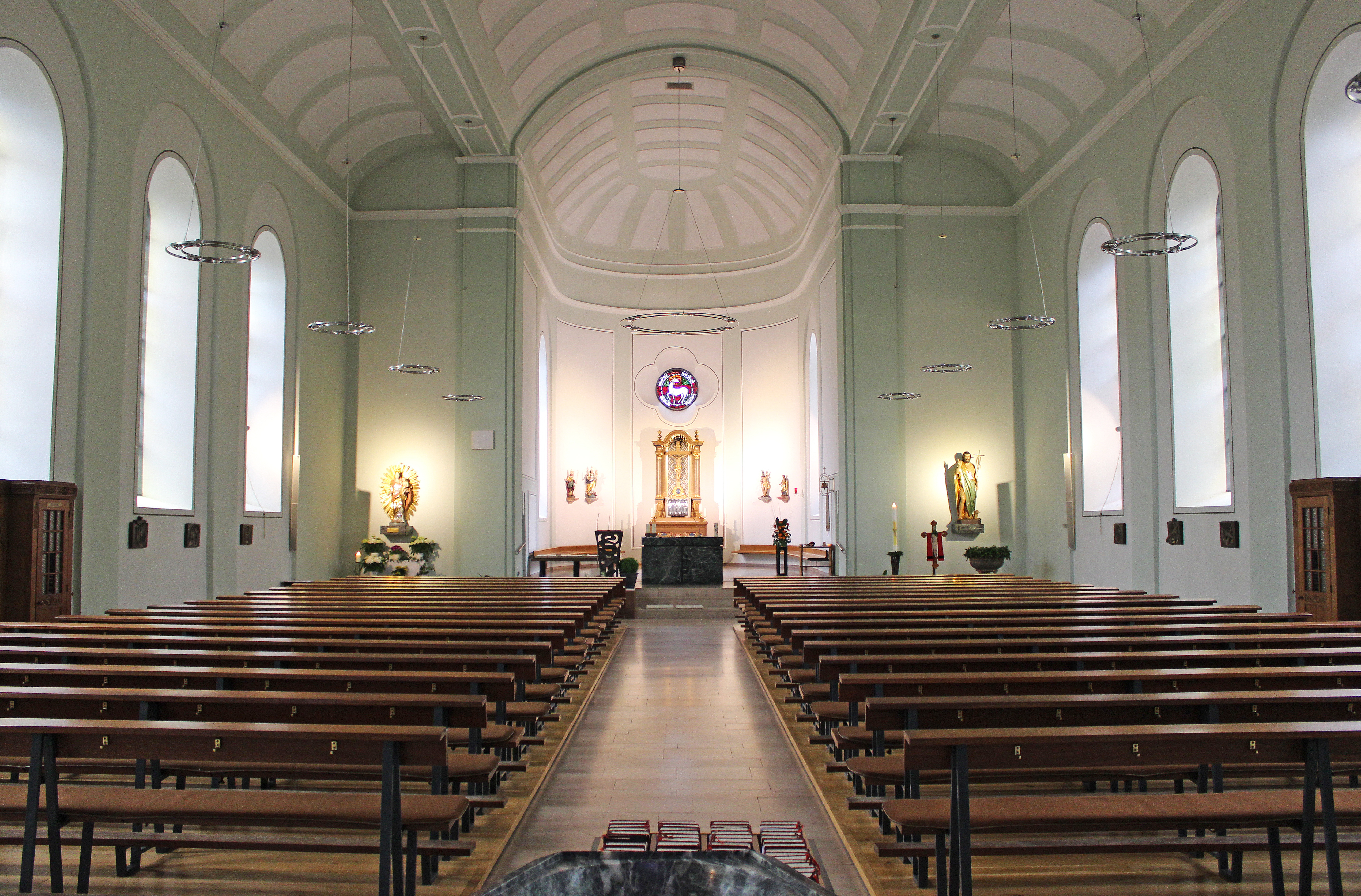 Blick ins Innere der katholischen Kirche St. Johann in Dillingen, Landkreis Saarlouis, Saarland